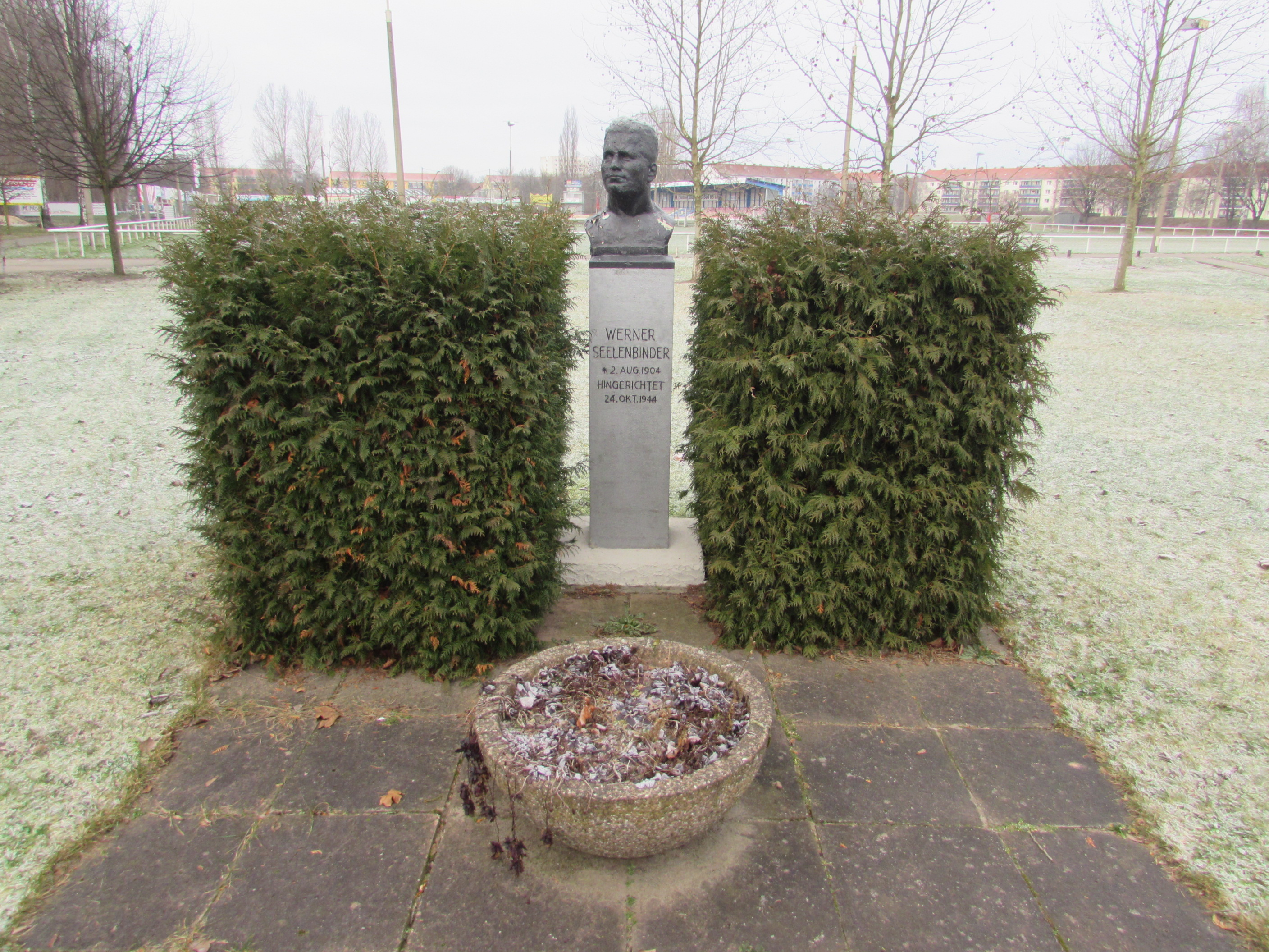 werner-seelenbinder-büste am Werner seelenbindersportplatz brandenburg